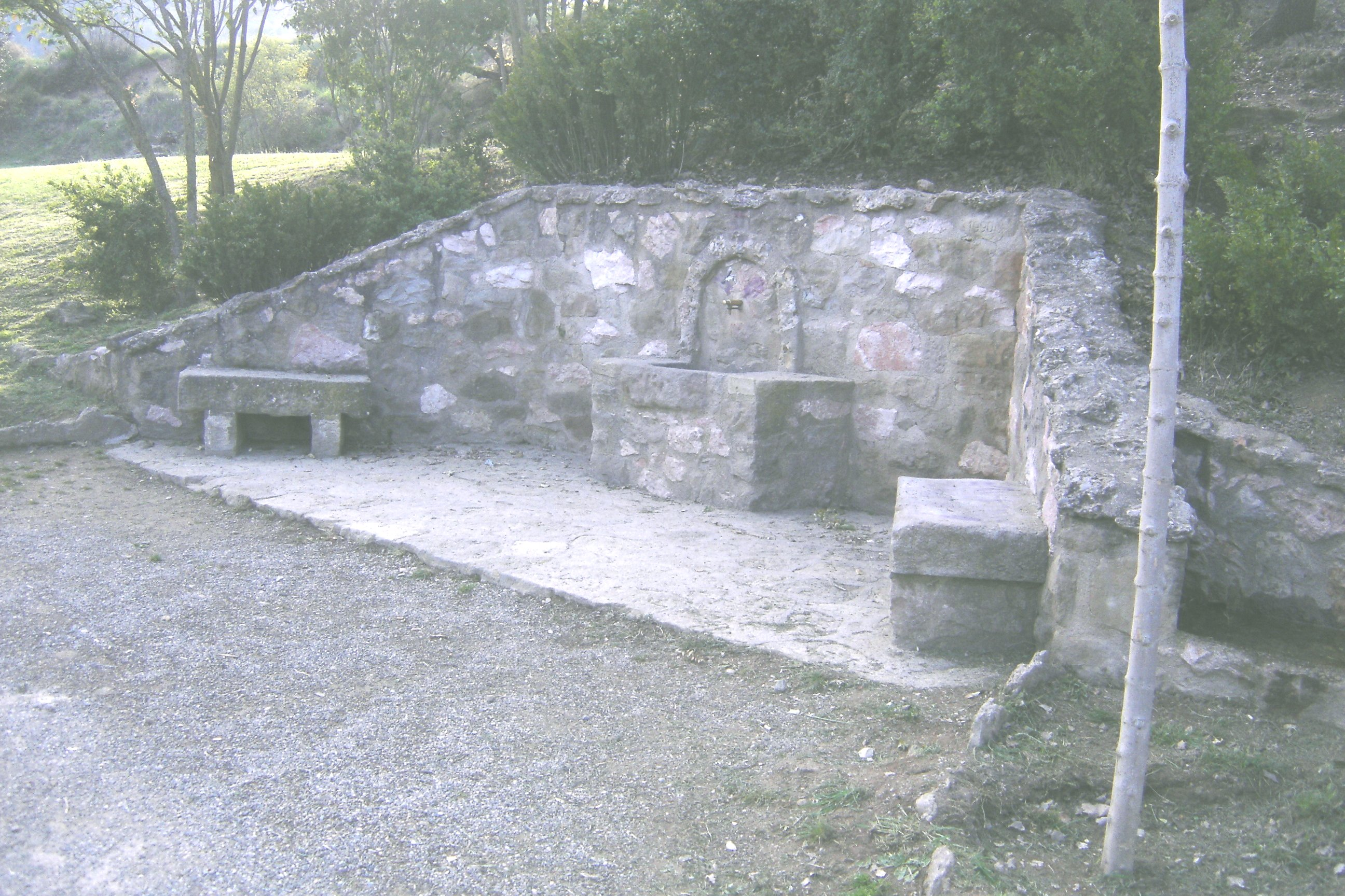 La font de l'Ocell, al municipi de Solsona (Solsonès)